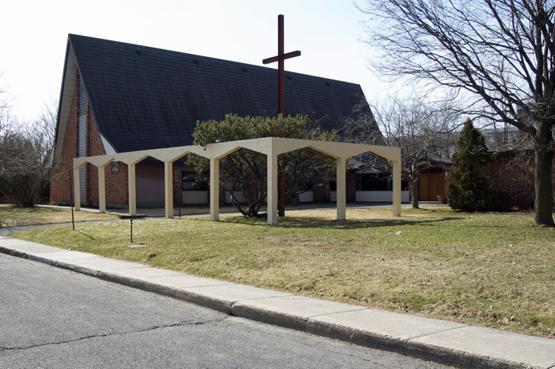 Église Unie Mount Bruno, à Saint-Bruno-de-Montarville, face au lac du Village.